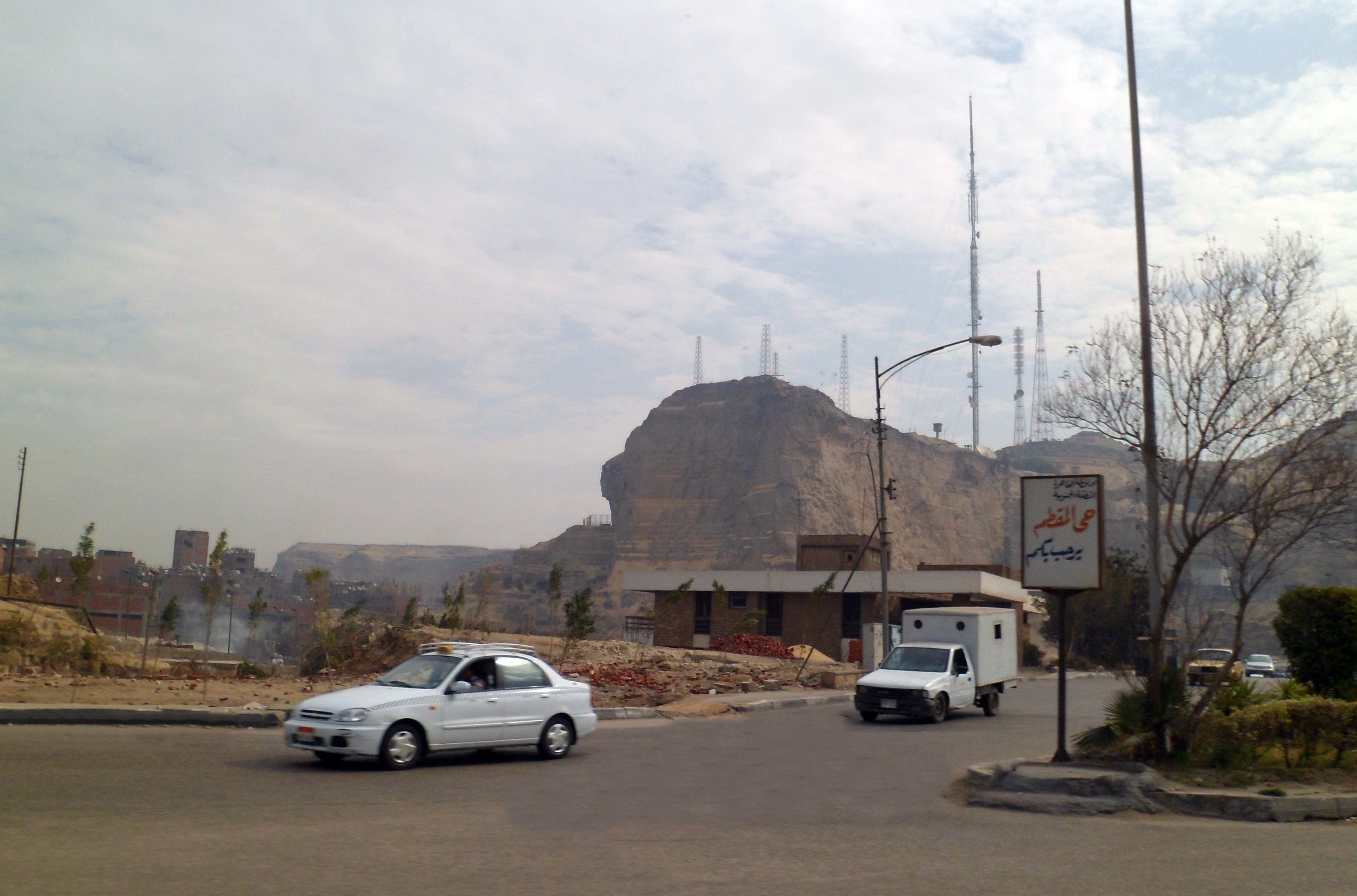 بداية حي المقطم